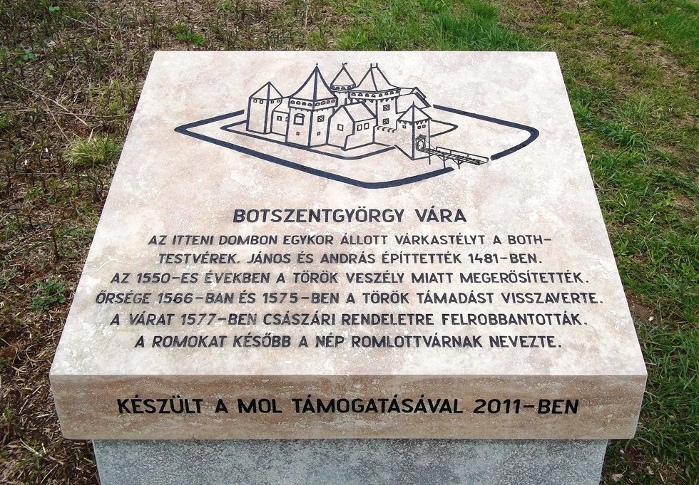 Stèle commémorative près du site de l'ancien château de Botszentgyörgy, Nagykanizsa, Hongrie.